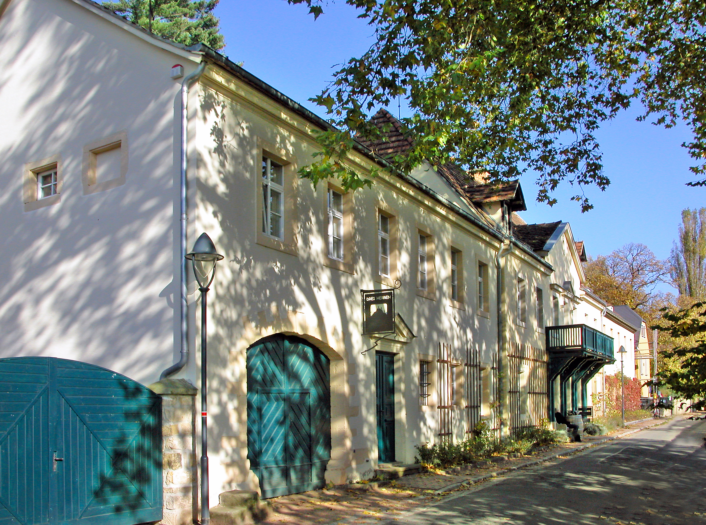 23.10.2008 01445 Radebeul-Oberlößnitz: Weinbergstraße 34/34A. Weingut "Drei Herren" (historisch Herrmannsberg). [DSCN34913.TIF]20081023265DR.JPG(c)Blobelt